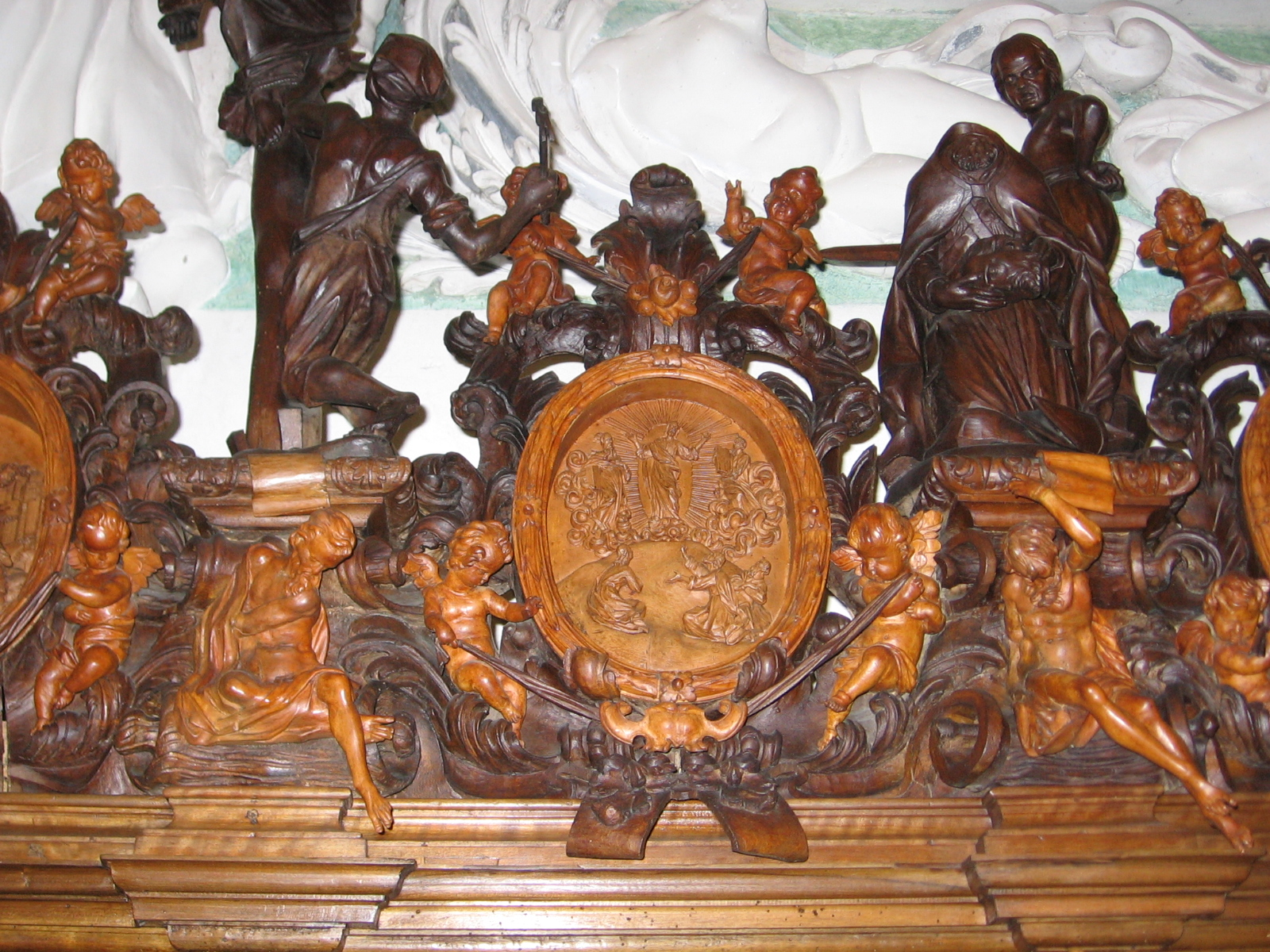 Museo le Sagrestie, Alzano Lombardo, BG (ITALIA)